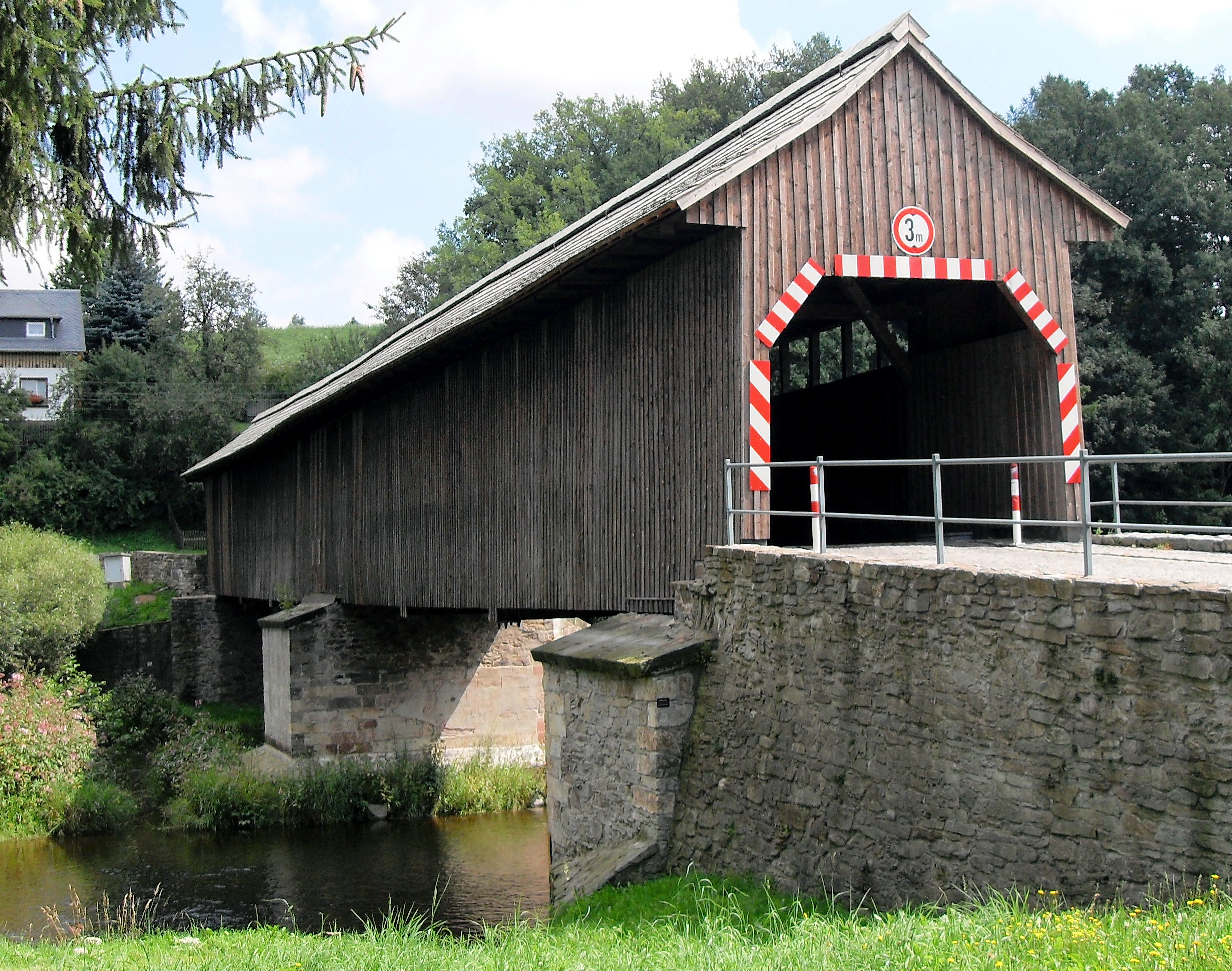 Überdachte Holzbrücke über die Flöha in Hohenfichte, Ostseite